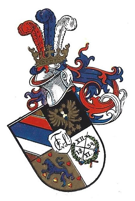 Studentenwappen des Corps Friso-Luneburgia zu Köln.